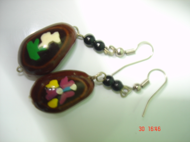 Artesanías de La Palma (Chalatenango)